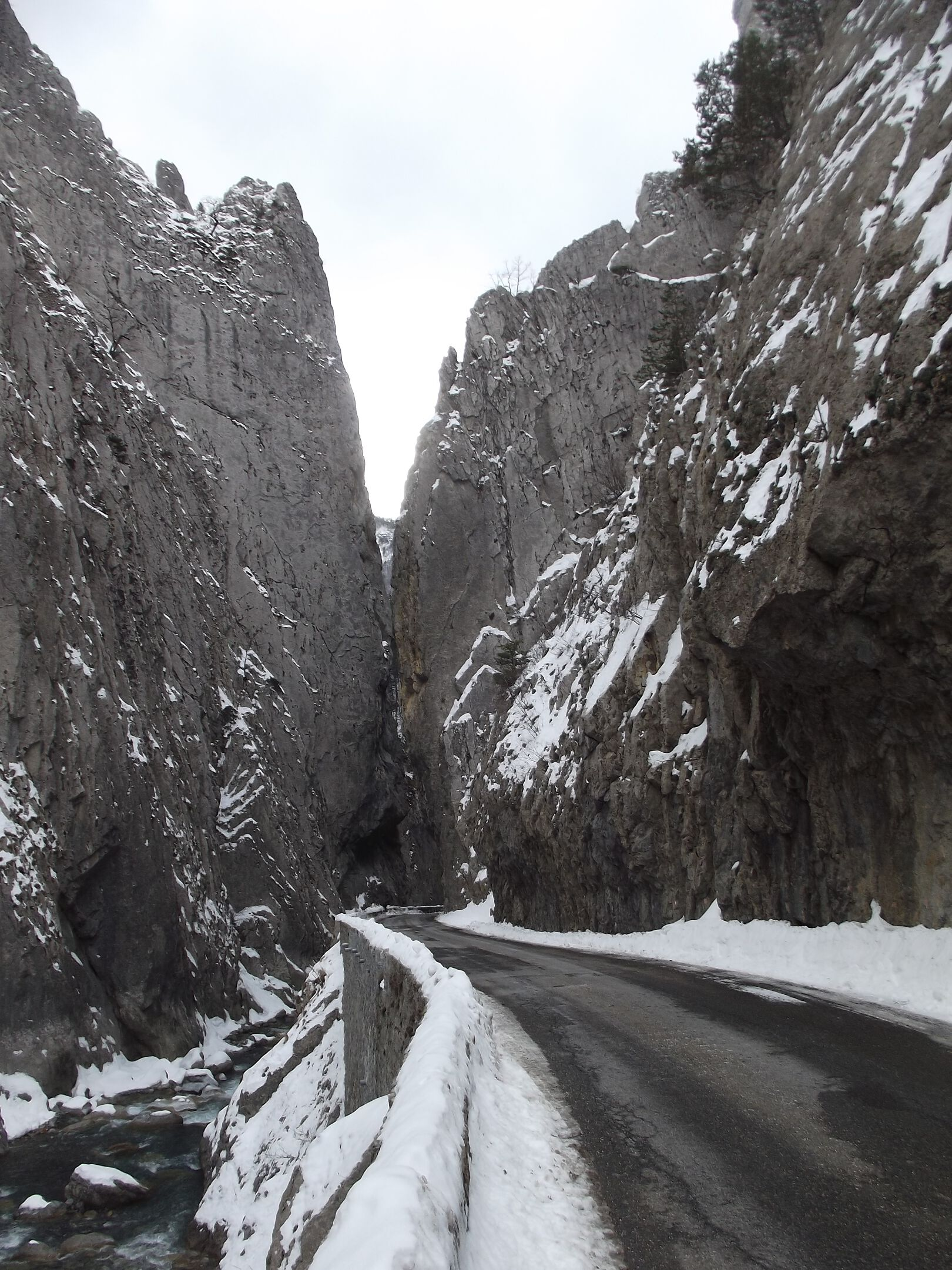 Clues de Barles en hiver